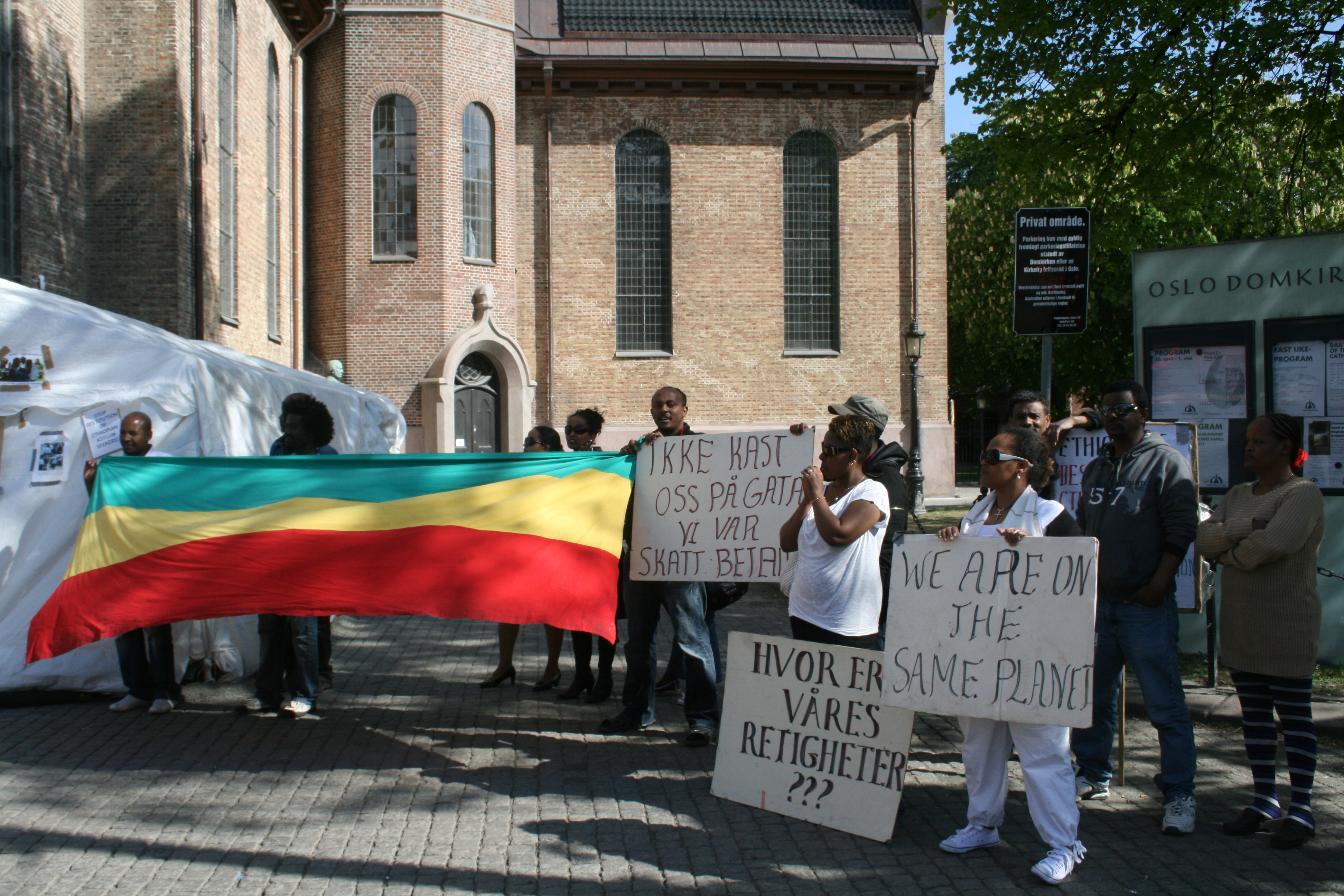 Fredsmarsjen stoppa foran Domkirka, der etiopiske asylsøkere har slått leir.